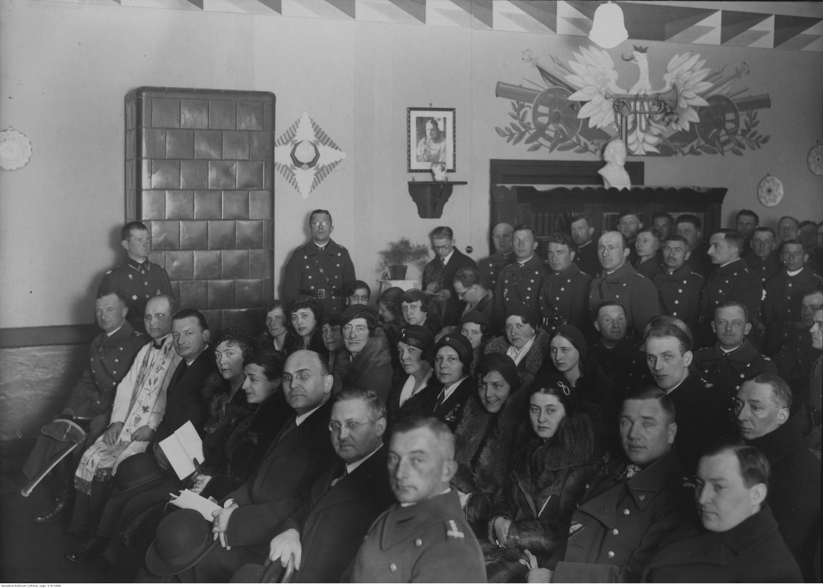 Poświęcenie świetlicy 7 Pułku Artylerii Ciężkiej, zorganizowanej przez Oddział Polskiego Białego Krzyża w Poznaniu, 18 marca 1933 r. Wśród uczestników uroczystości widoczni: prezes sekcji świetlicowej Polskiego Białego Krzyża p. Ogurkowska (2 z lewej w 2 rzędzie), wojewoda poznański hr. Roger Adam Raczyński (3 z lewej w 1 rzędzie), p. Frankowa (4 z lewej w 1 rzędzie), kurator Okręgu Szkolnego dr Michał Pollak (3 z prawej w 1 rzędzie), prezes Dyrekcji Poczt i Telegrafów w Poznaniu Sylwester Maciejewski (2 z prawej w 1 rzędzie), dowódca 7 dak-u płk Zygmunt Łakiński (1 z prawej w 1 rzędzie), zastępca dowódcy pułku ppłk Tadeusz Rawski (1 z lewej w 1 rzędzie), sekretarz wojewody Rakowski (pierwszy z prawej w drugim rzędzie) oraz ks. kapelan Franciszek Dymarski (2 z lewej w 1 rzędzie). Koncern Ilustrowany Kurier Codzienny - Archiwum Ilustracji. Sygnatura: 1-W-1528